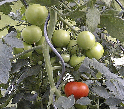 Tomaten im Treibhaus